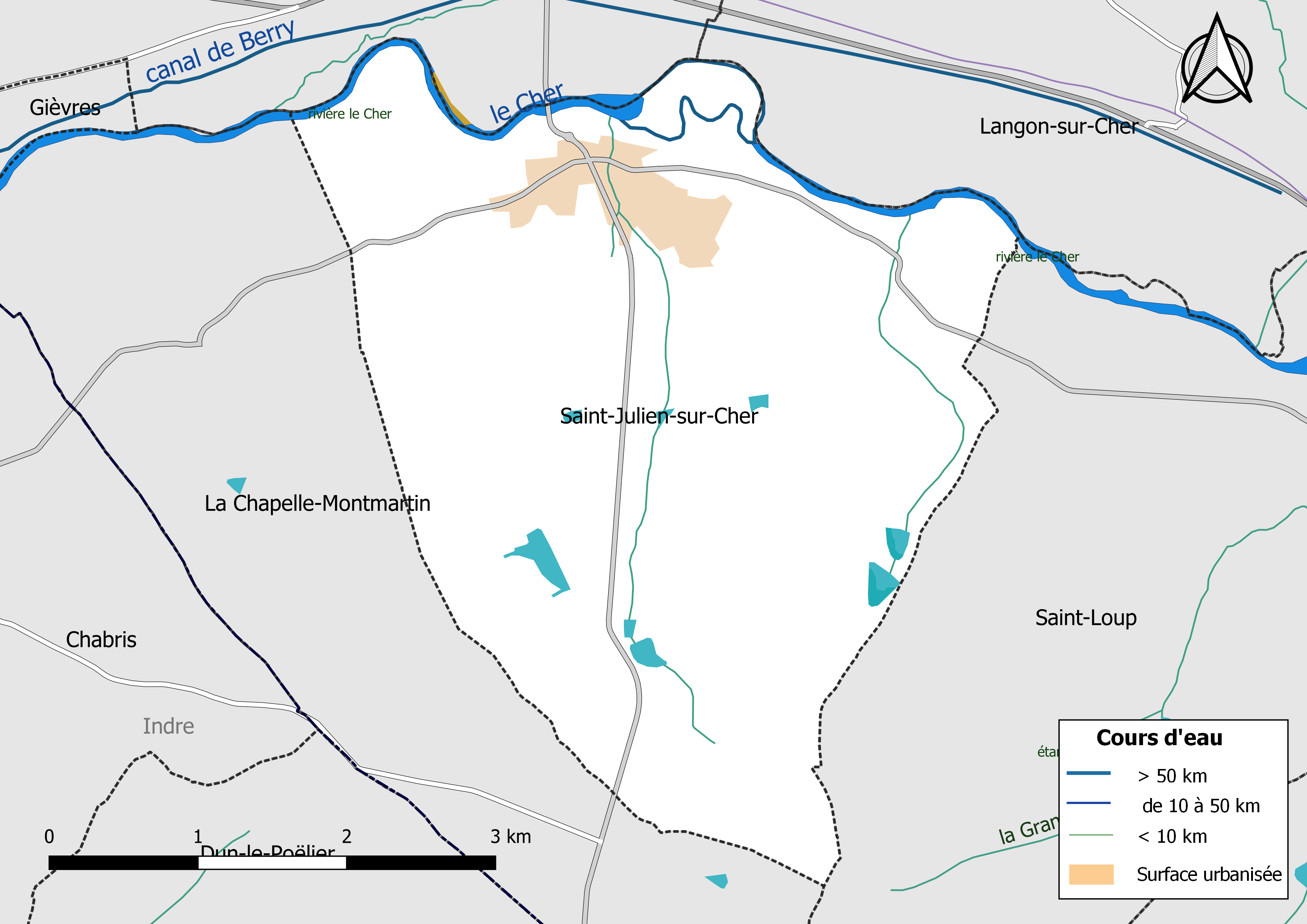 Carte du réseau hydrographique de la commune de Saint-Julien-sur-Cher (Loir-et-Cher, France).